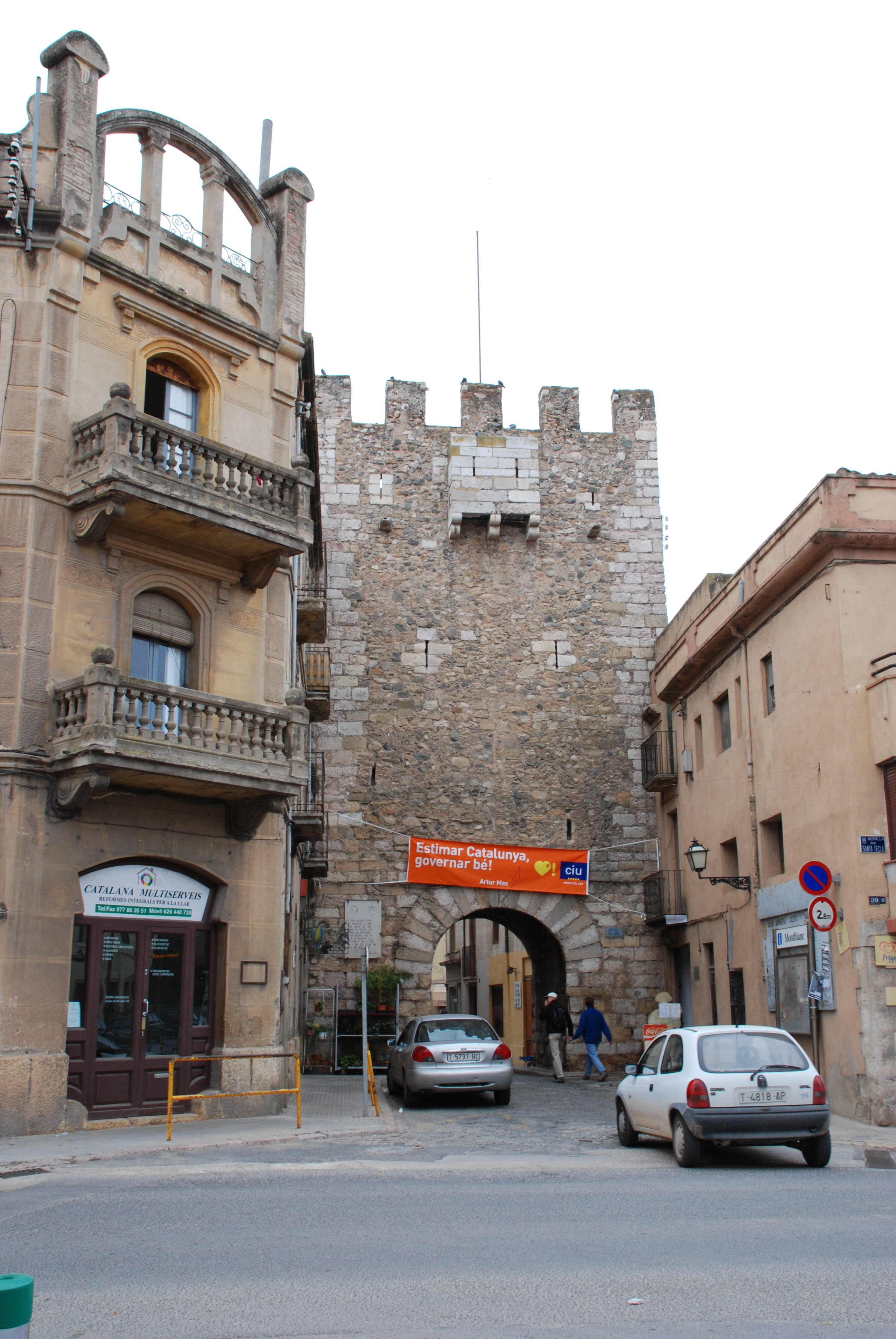 Spain, Catalunya, Montblanc, Portal de Bove